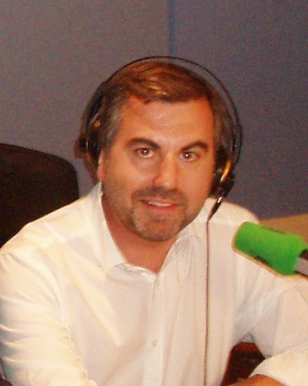 Carlos Alsina en los estudios de Onda Cero.